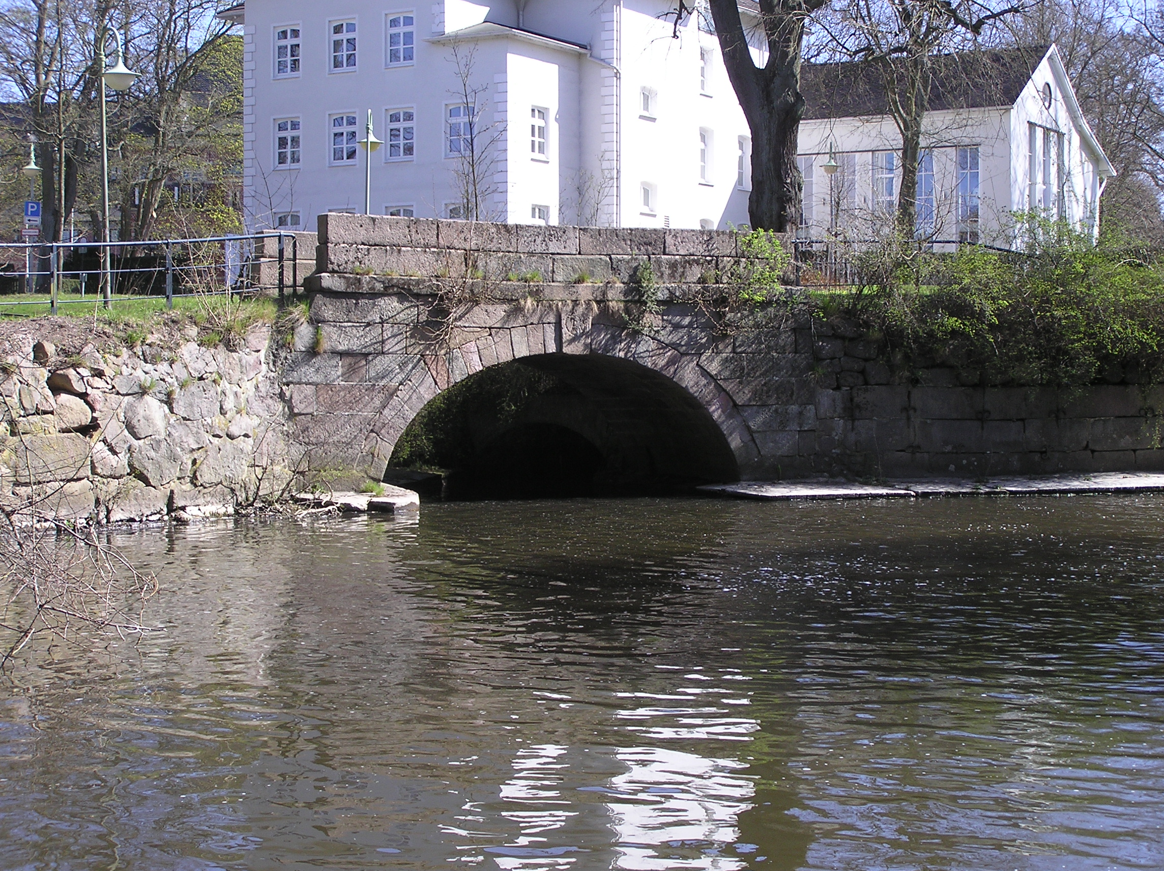 "Dänenbrücke" in Reinbek von 1793 Object location53° 30′ 25.59″ N, 10° 15′ 06.19″ E